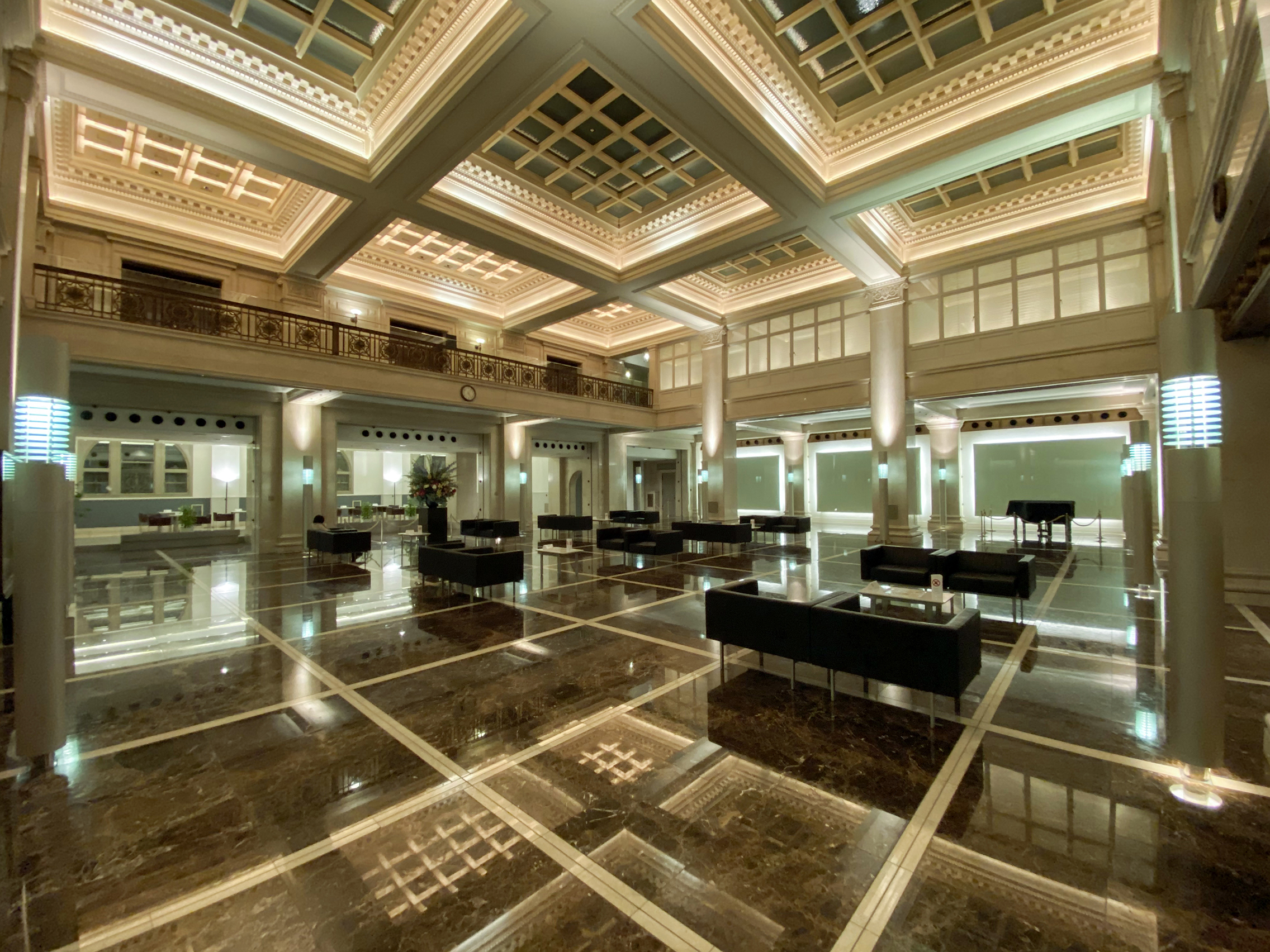 Meiji Seimeikan Lobby